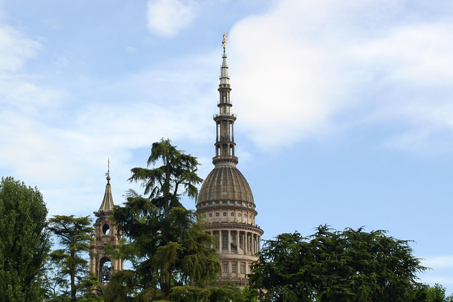 Panoramica cupola e campanile Basilica di San Gaudenzio - Novara